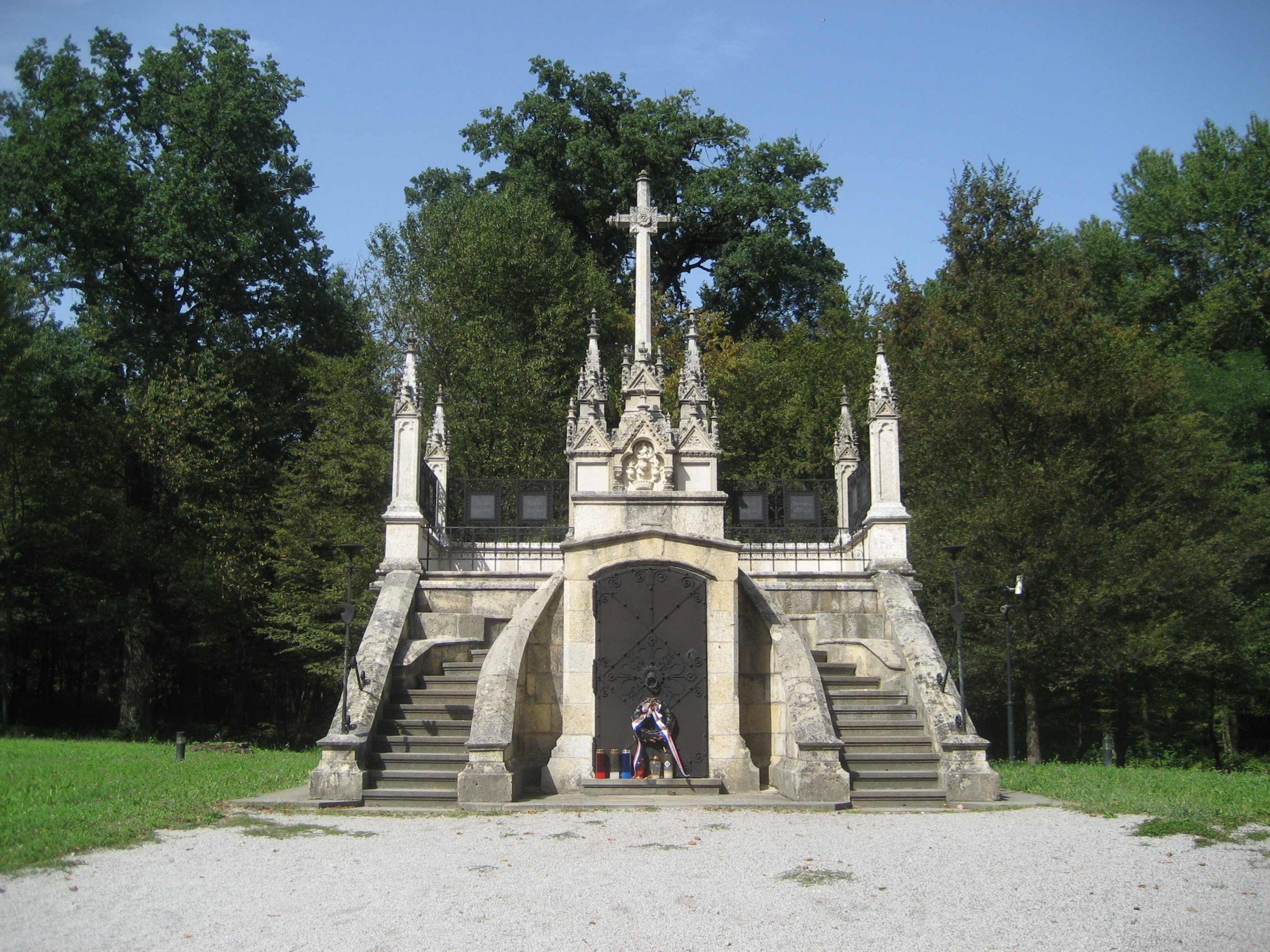 Familiengruft der Jelacic auf deren Schlossgut Novi Dvori in Zapresic. Gruft der Familie Jelacic auf deren Schlossgut Novi Dvori in Zaprešić.